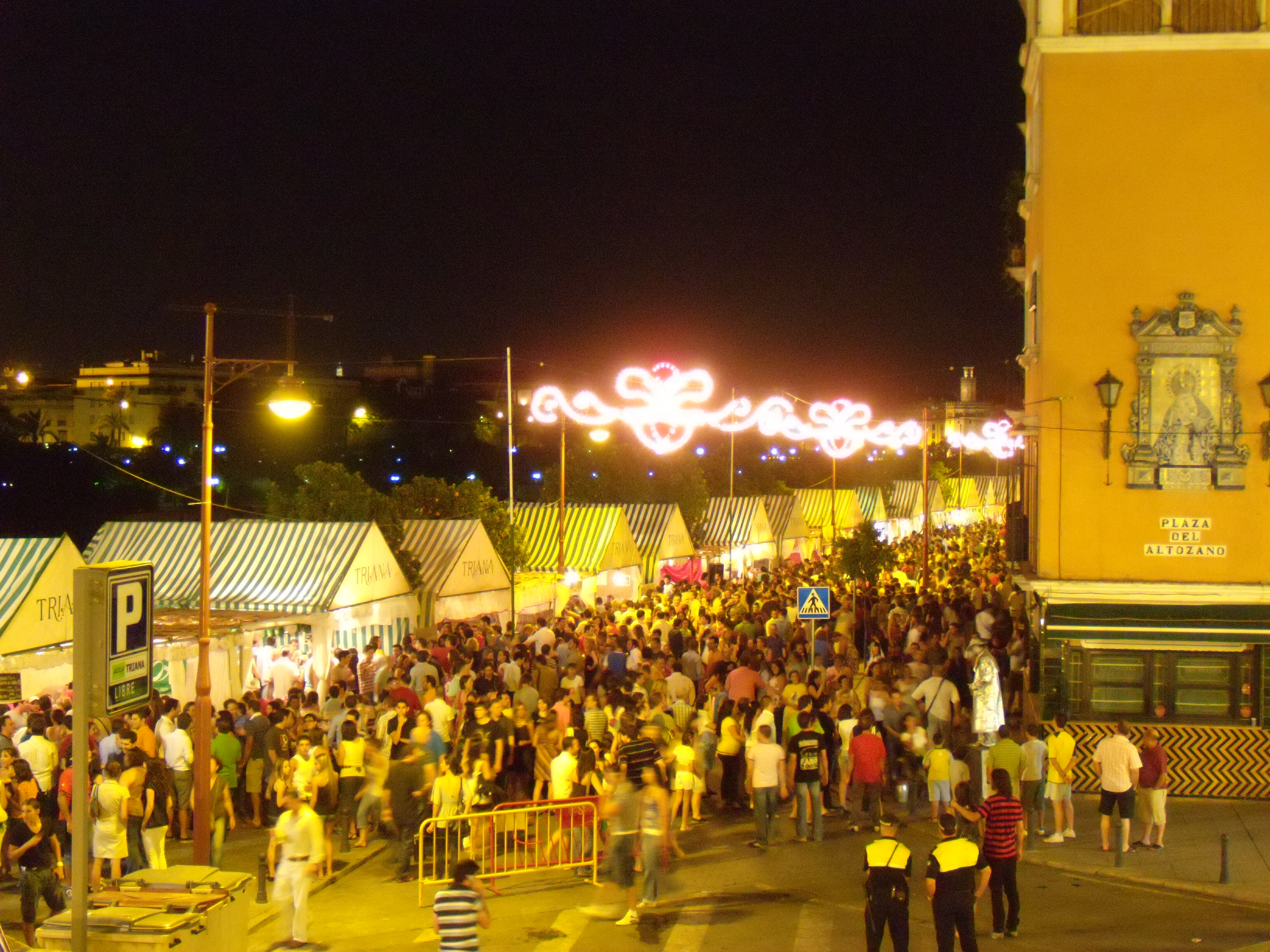 La calle Betis (Sevilla, España) durante la Velá de Santa Ana